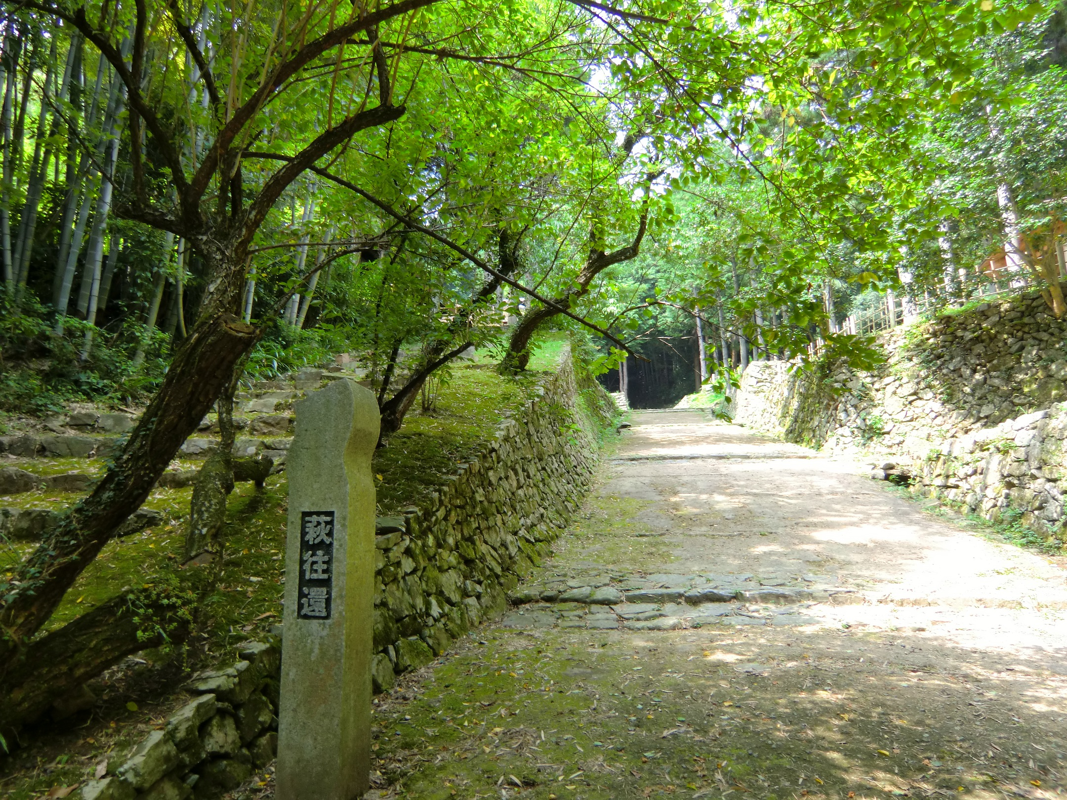 萩往還の途中にある六軒茶屋跡付近の様子（山口県山口市）